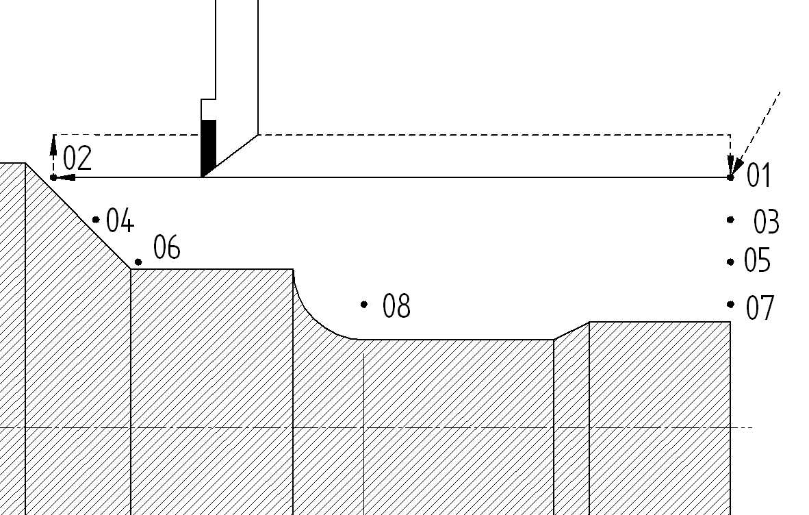 Tugipunktide määramine koorivtöötlusel